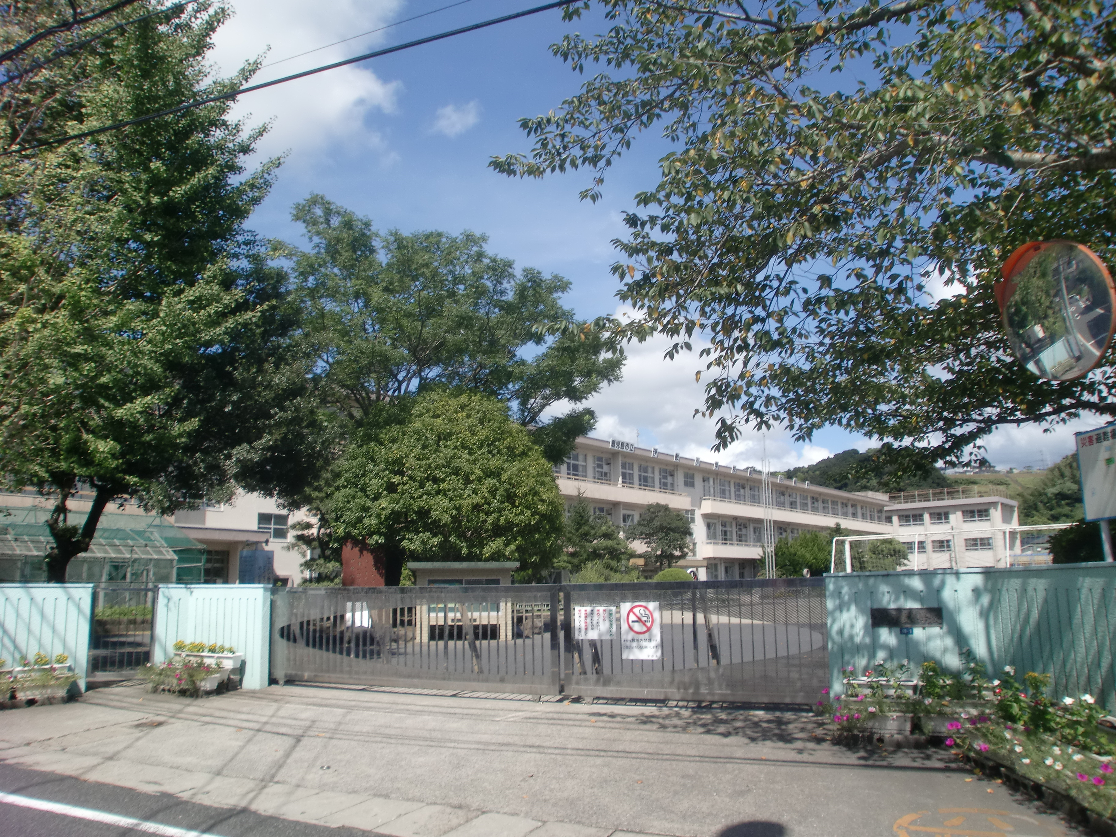 鹿児島市立伊敷小学校の外観